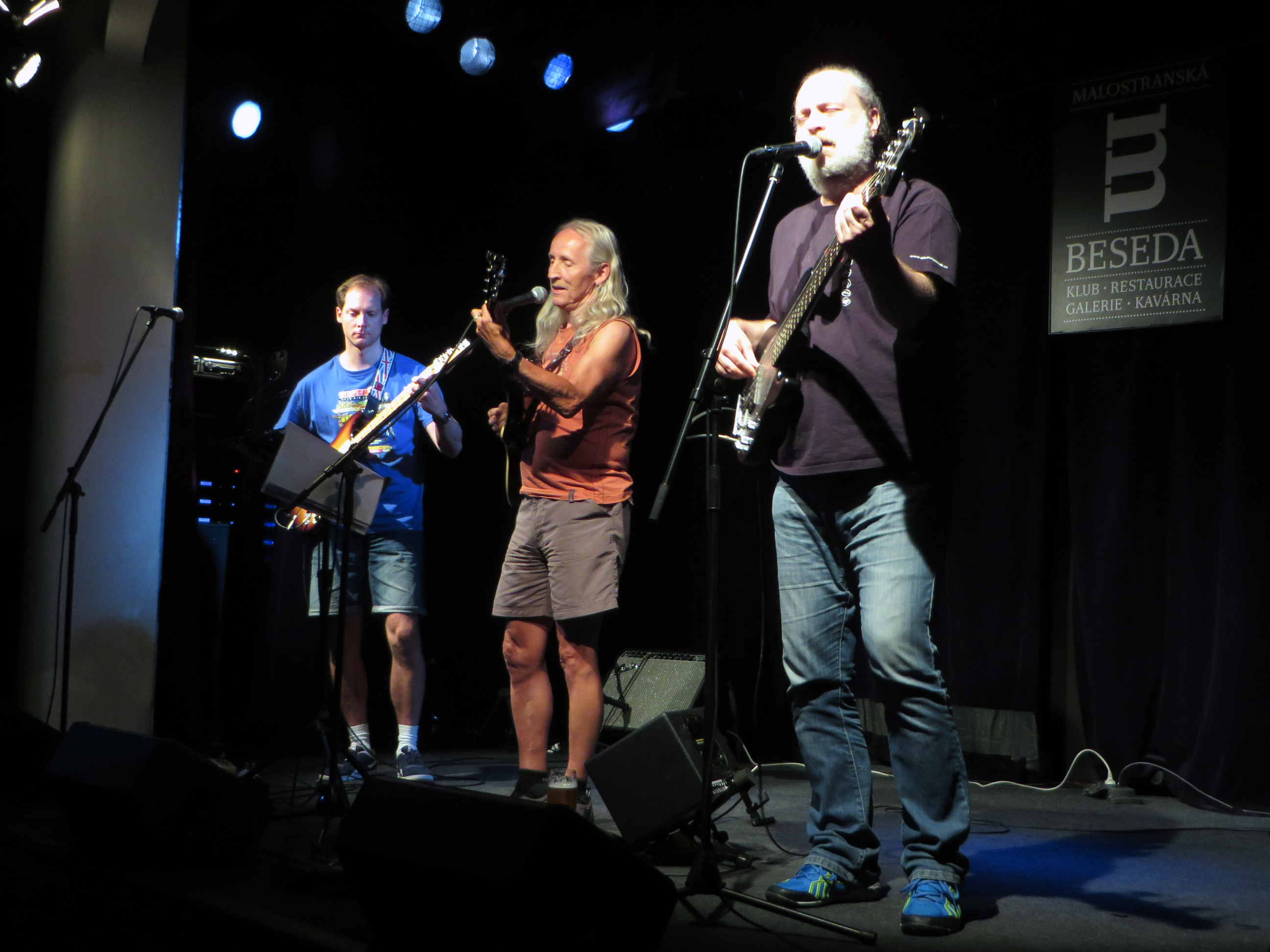 Výstava o Jazzové sekci v Měšťanské besedě. Koncert Bluesberry.